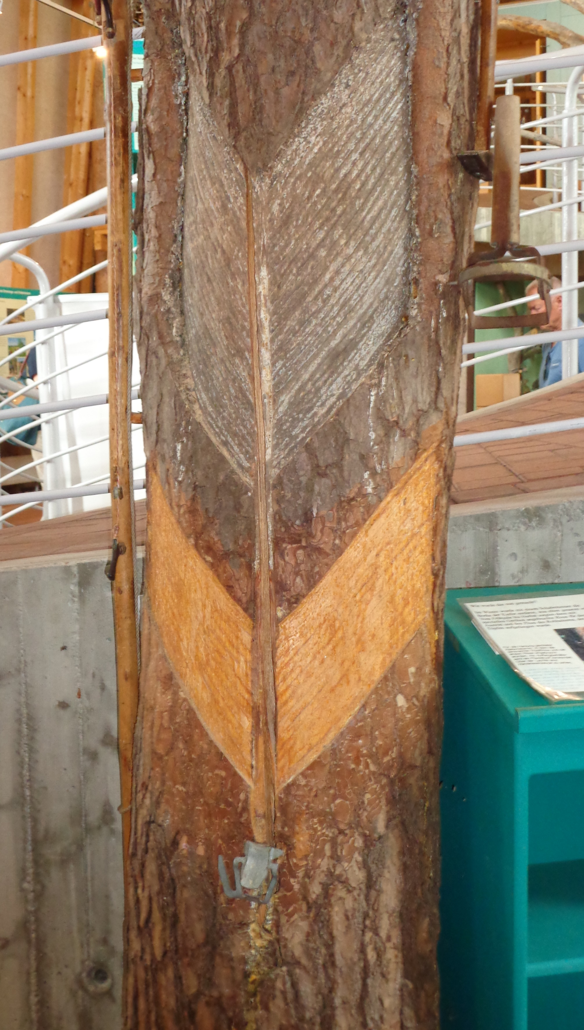 Ausstellungsstück eines entharzten Kiefernstamms im Informationszentrum vom Naturpark Nossentiner/Schwinzer Heide, Karow (Plau am See)